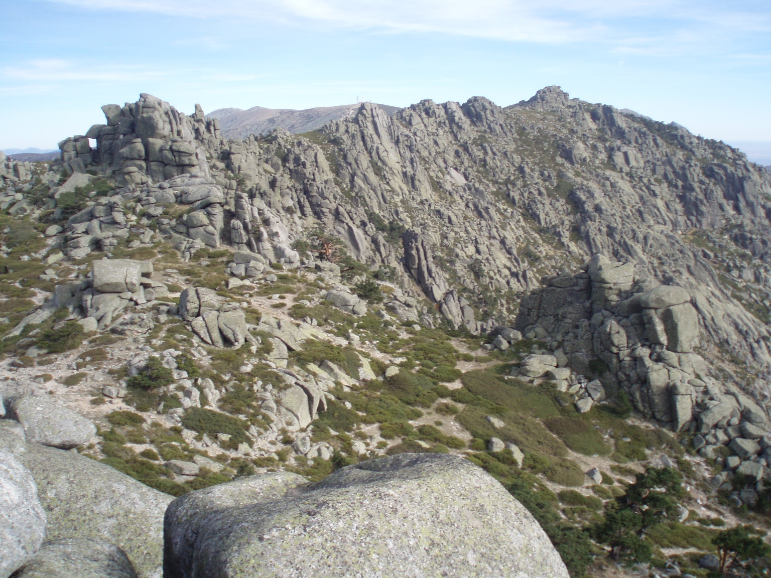 Siete Picos, en la Sierra de Guadarrama (España).